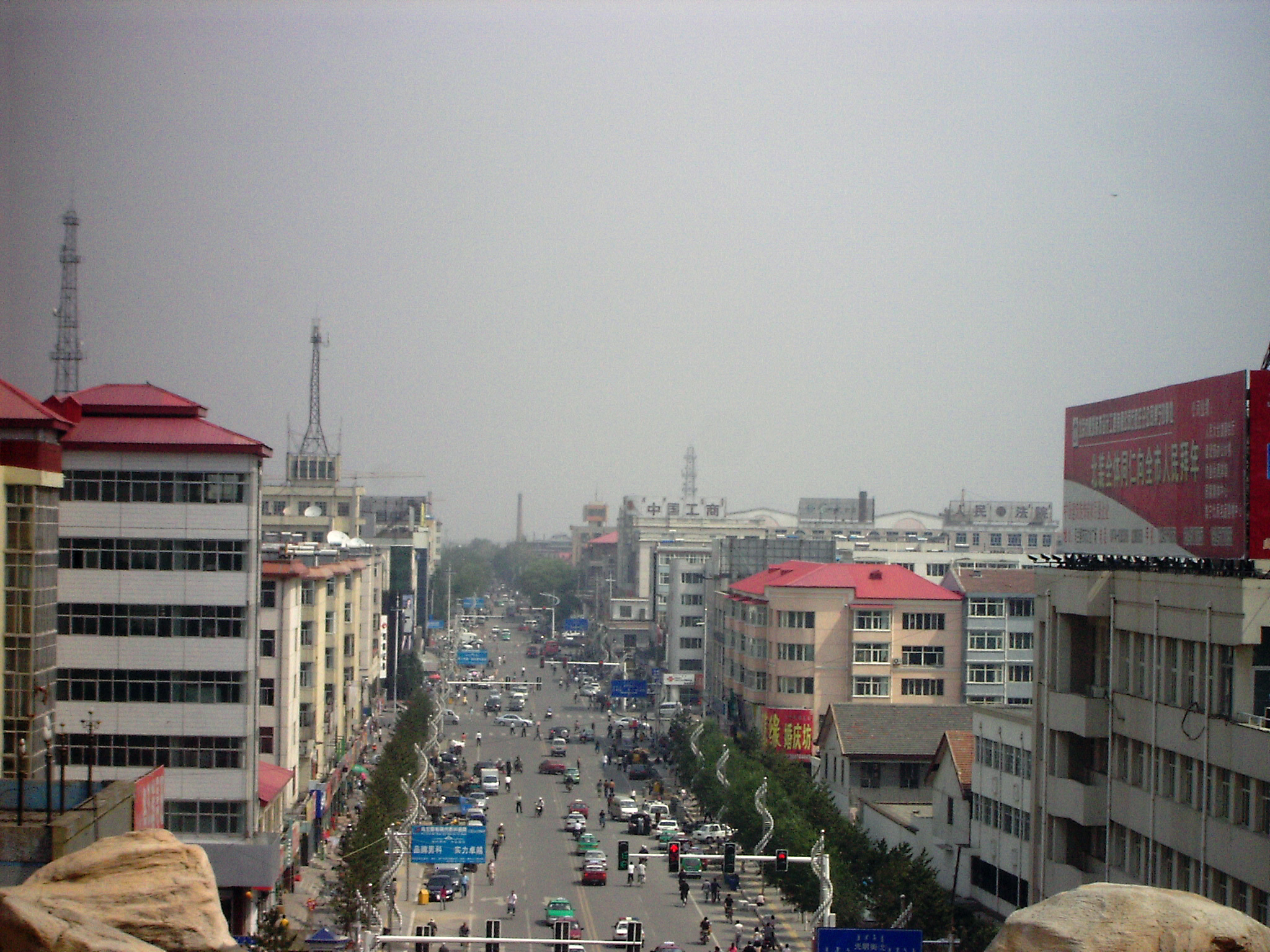 街景